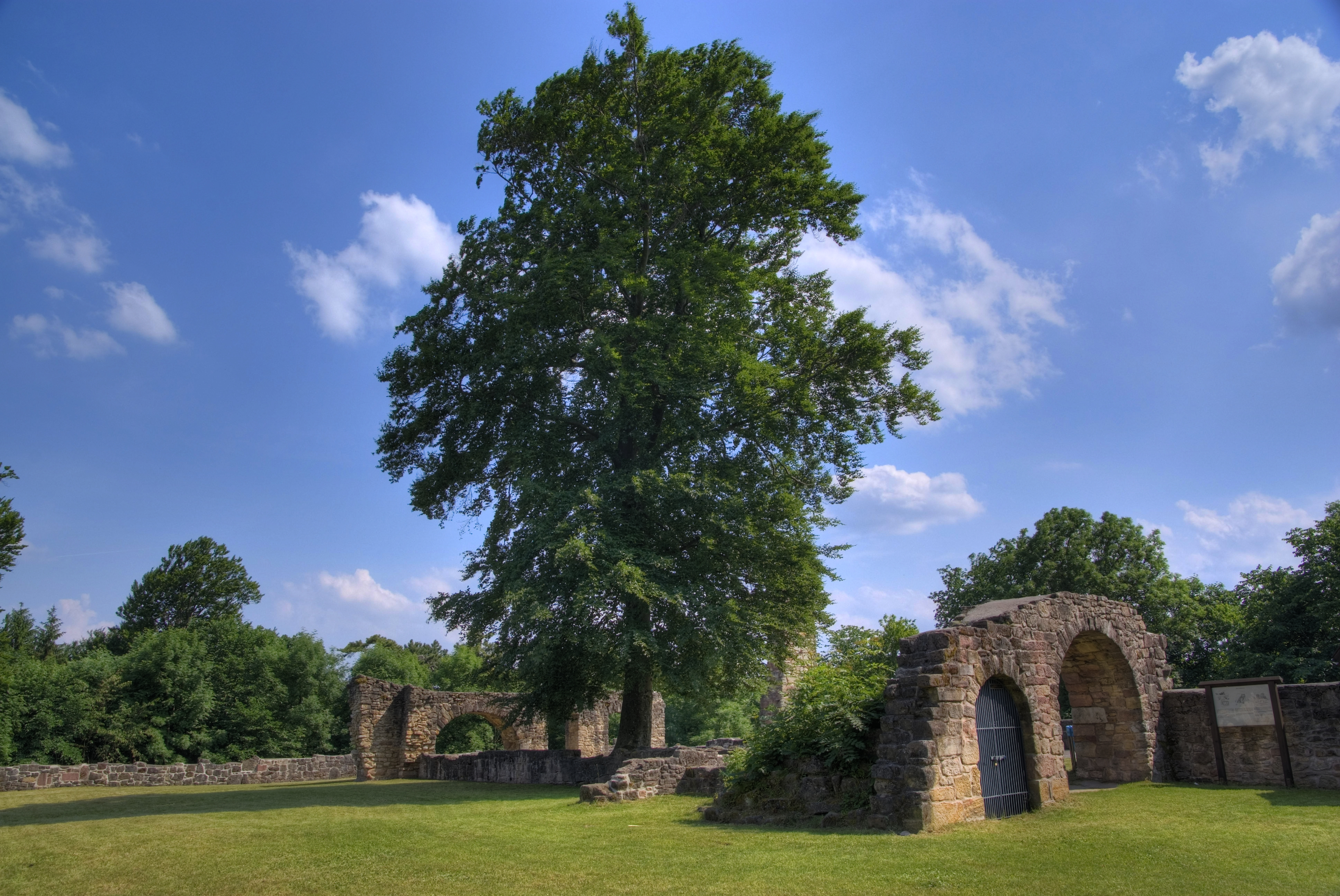 Lauterburg